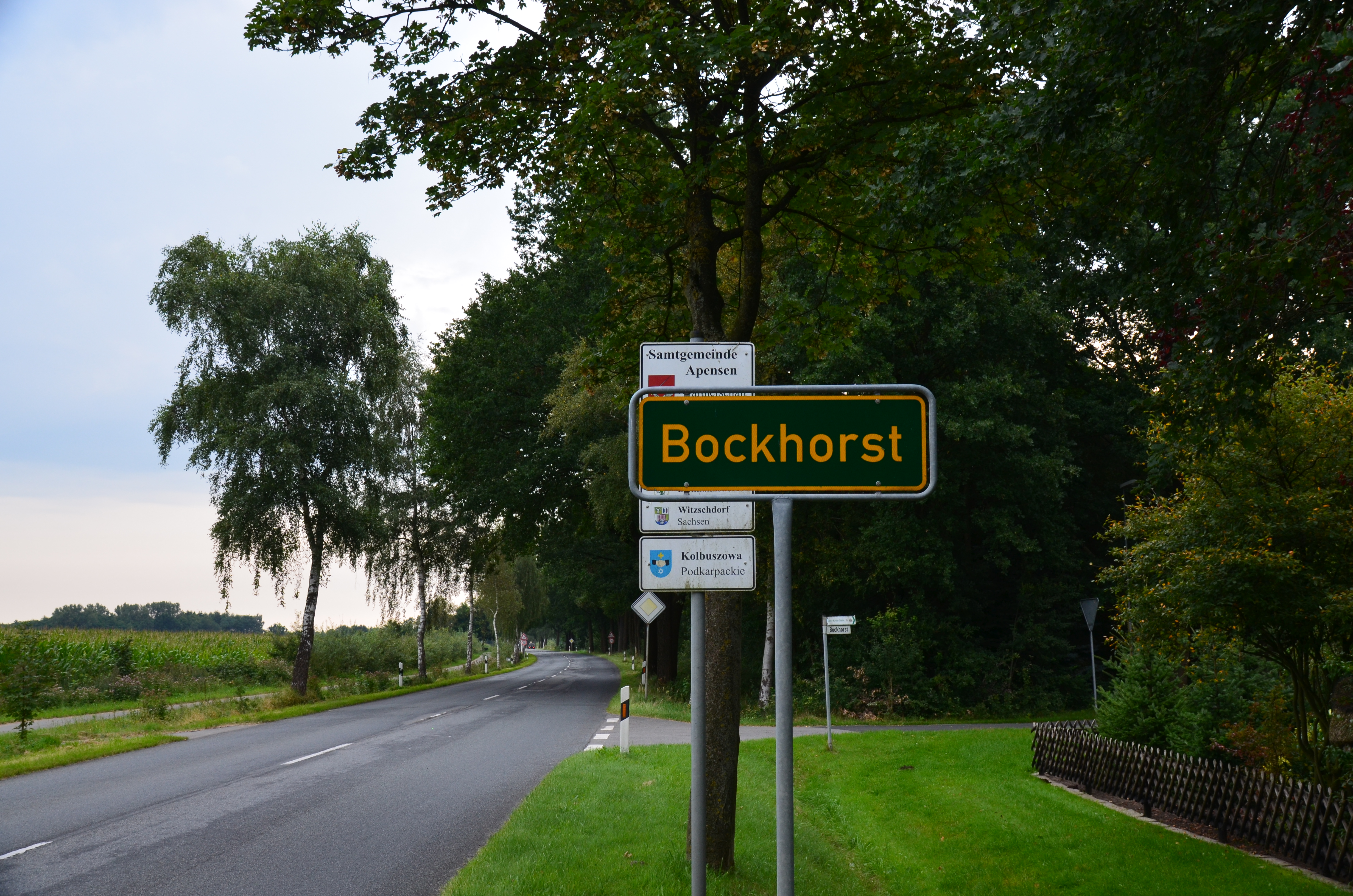 Bockhorst in der Gemeinde Sauensiek, Samtgemeinde Apensen an der L 130